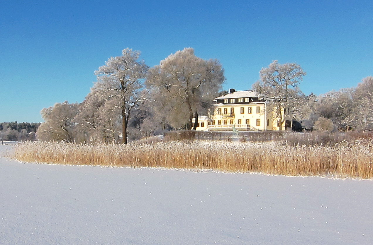 Boxtorp, vinterbild (beskuren version)